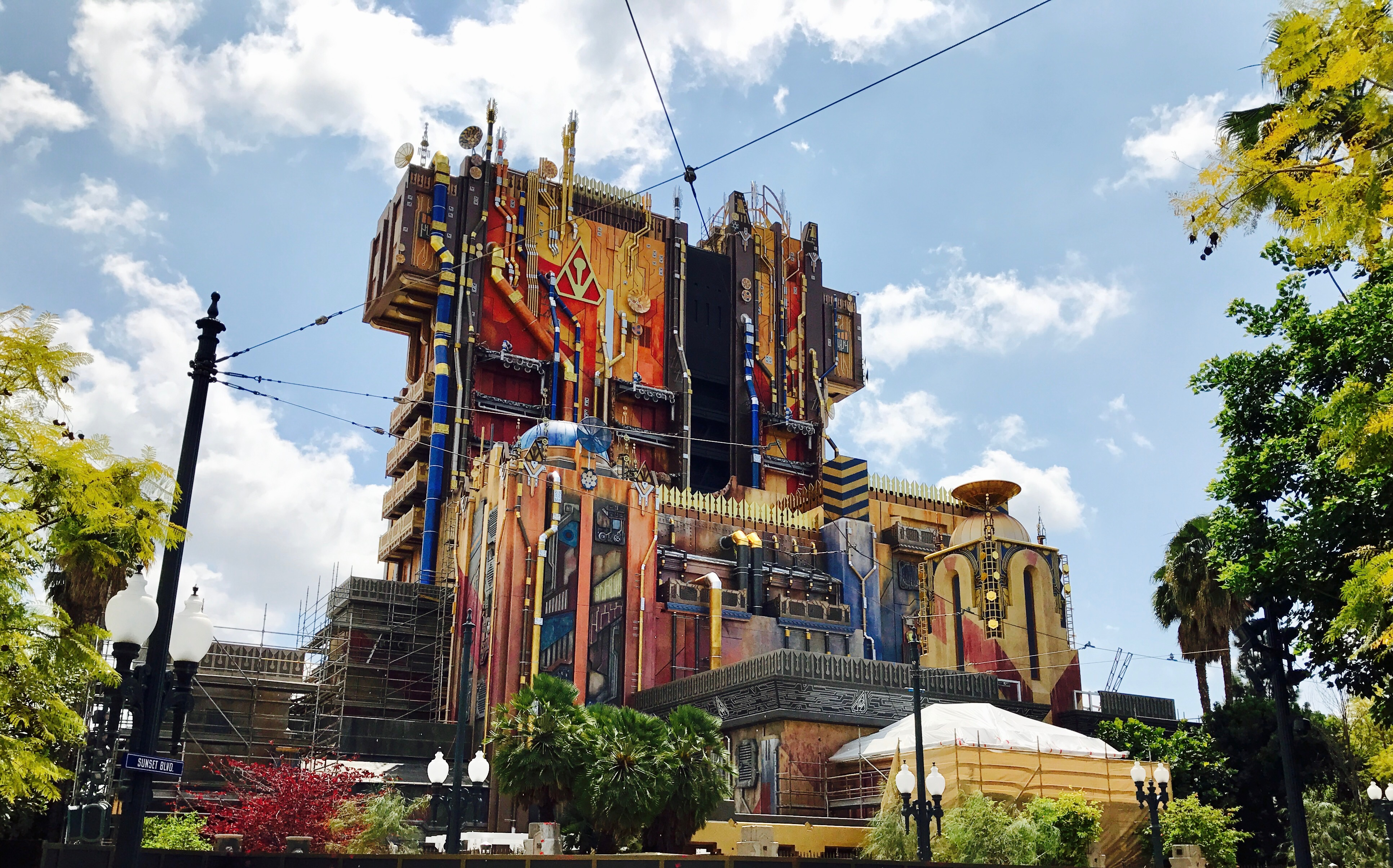 GOTG ride